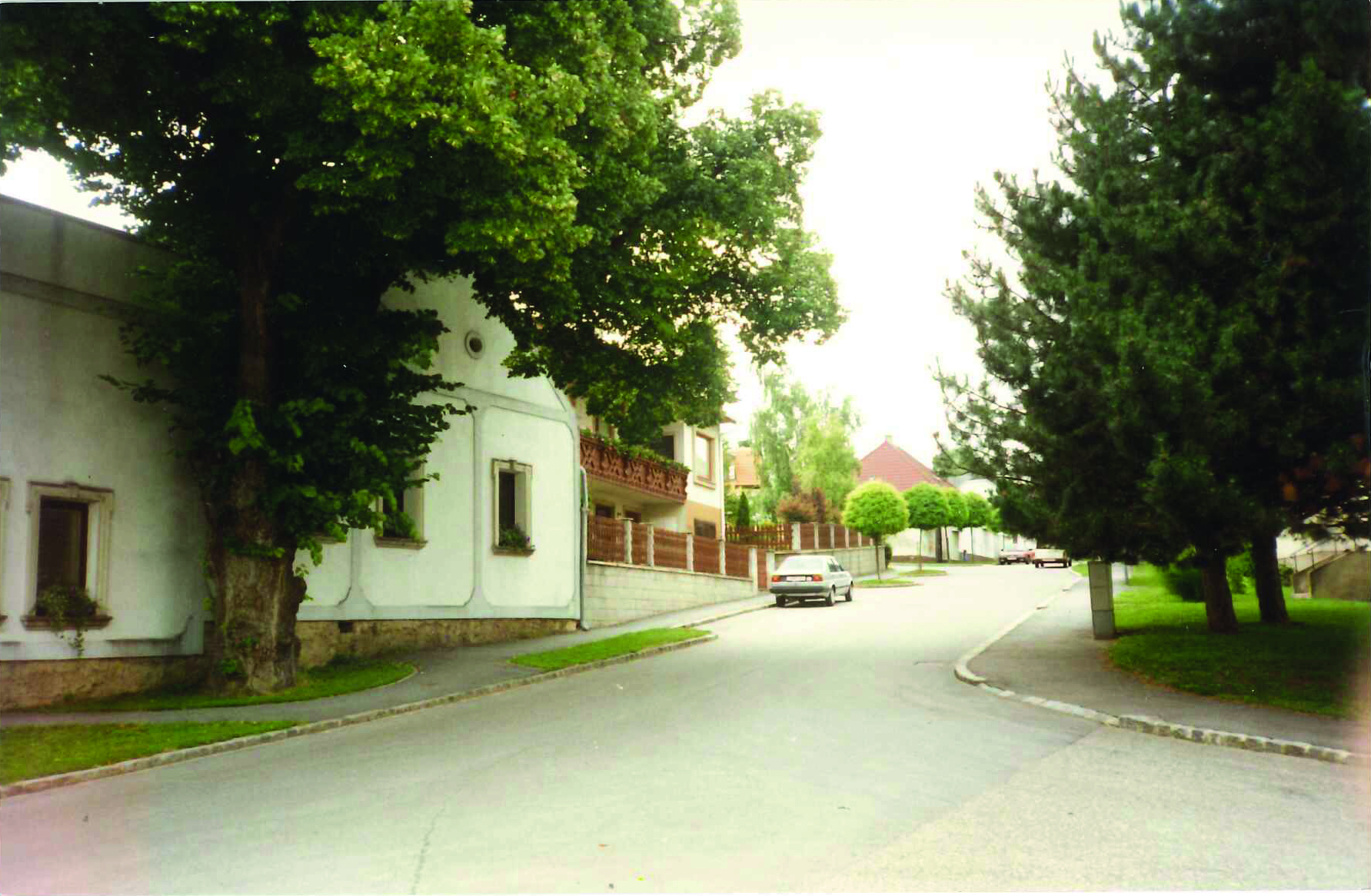 Kaisersteinbruch Hauptstrasse, li. das ehemalige Dreißigstamt von 1708. (Das Haus ist wesentlich älter) Das Bild stammt aus den 1990er Jahren, da standen diese Bäume noch. Mittlerweile umgeschnitten.